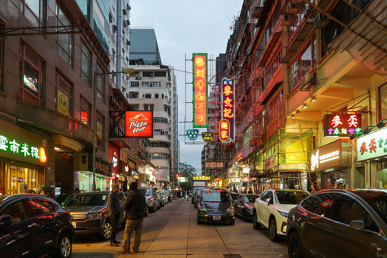 Parkes Street dusk view